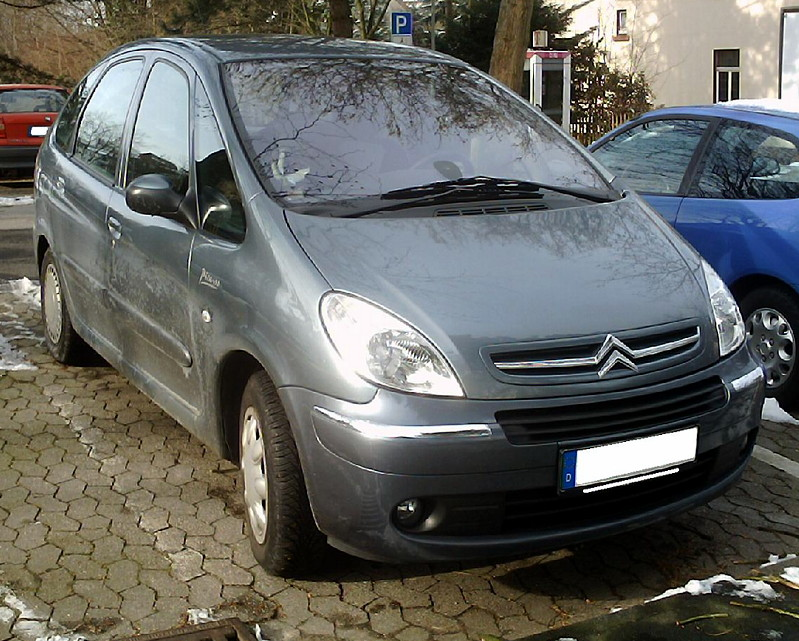 Das Bild zeigt einen Citroen Xsara Picasso.